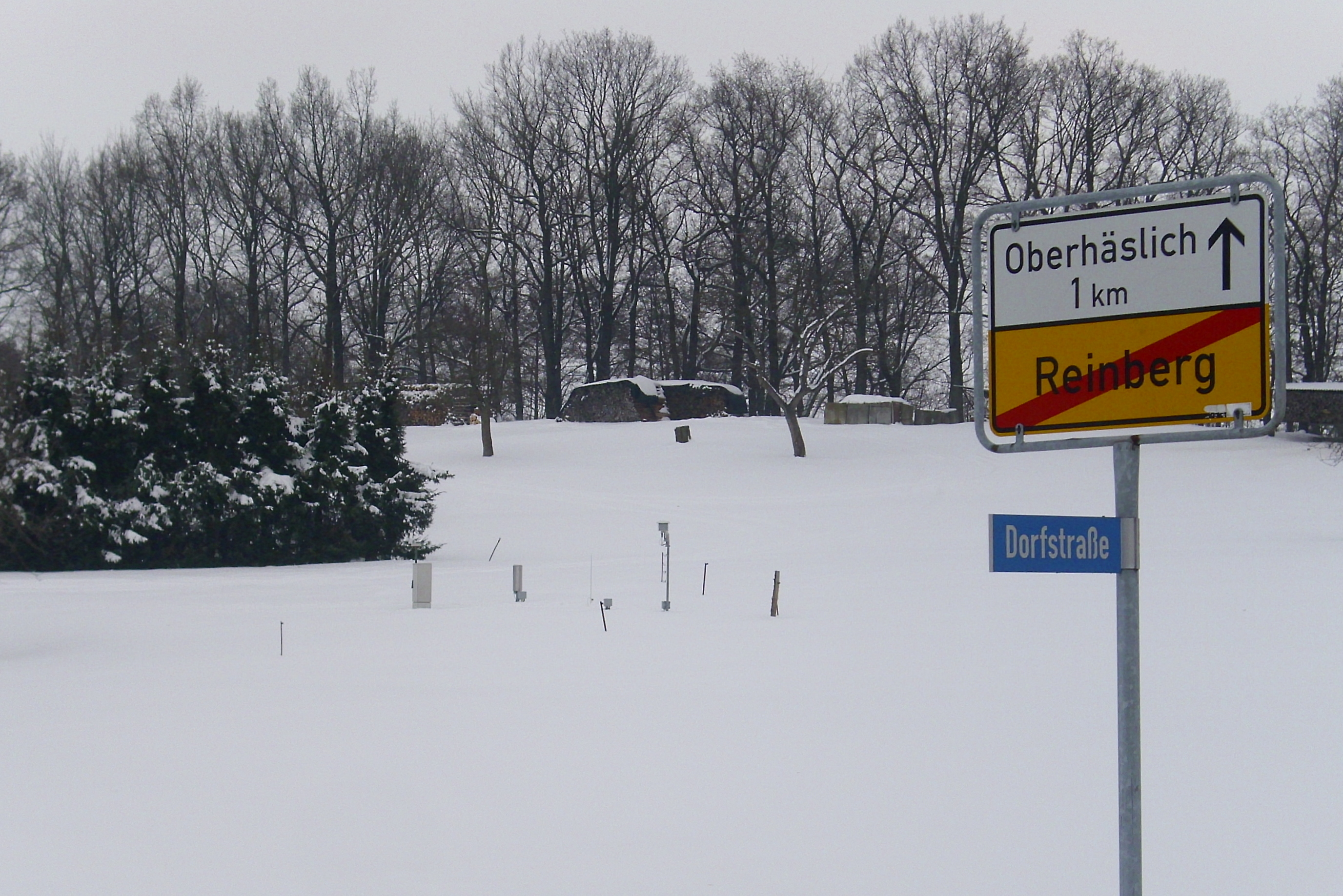 Allgemein bekannt als: "Die Stadt Dippoldiswalde machte ihrem Ruf als "Kältepol Sachsens" wieder alle Ehre: Dort sanken die Temperaturen auf minus 20,8 Grad." Reinberg ist ein Stadtteil von Dippoldiswalde